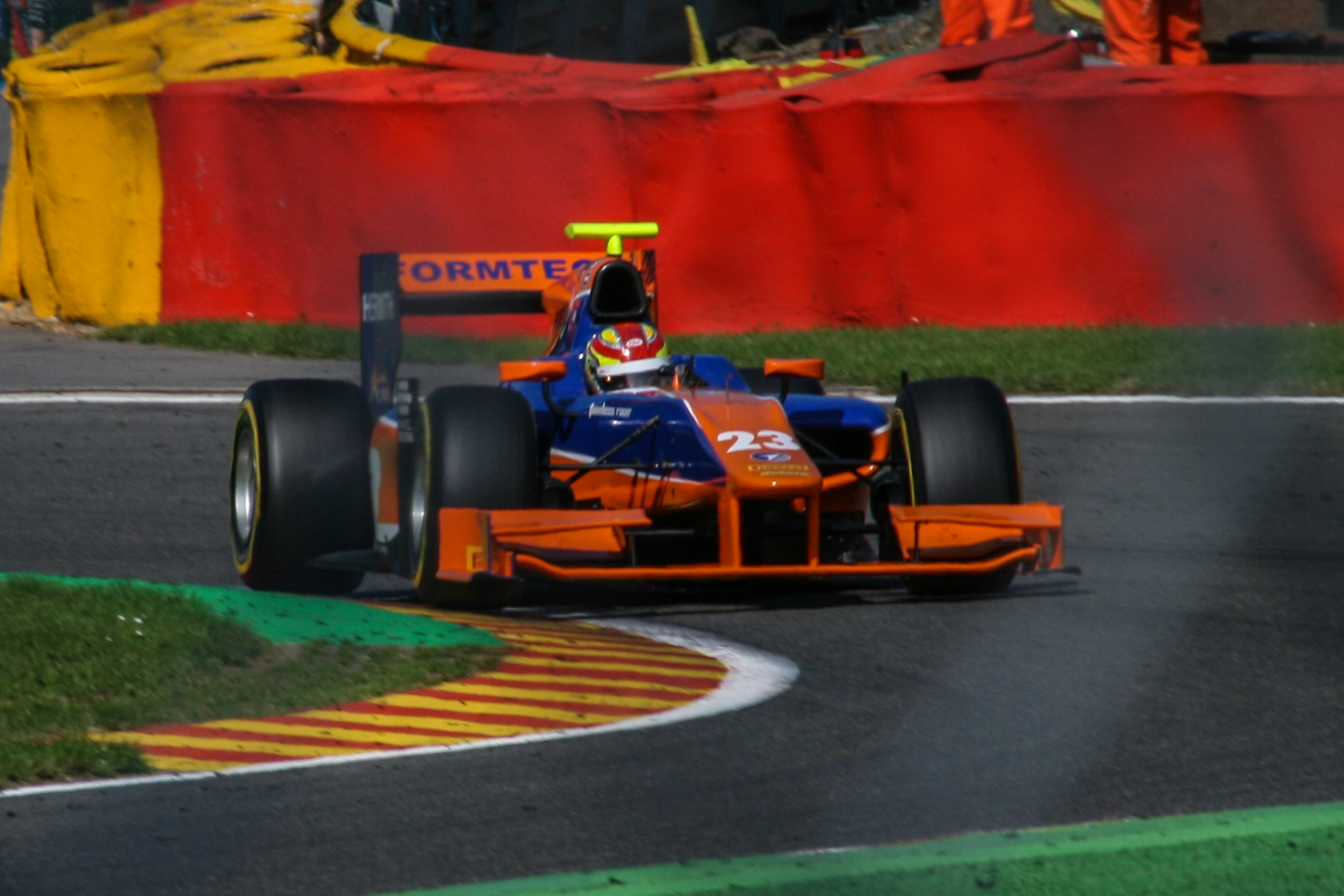 Robin Frijns beim freien Training der GP2-Serie in Spa-Francorchamps 2013.